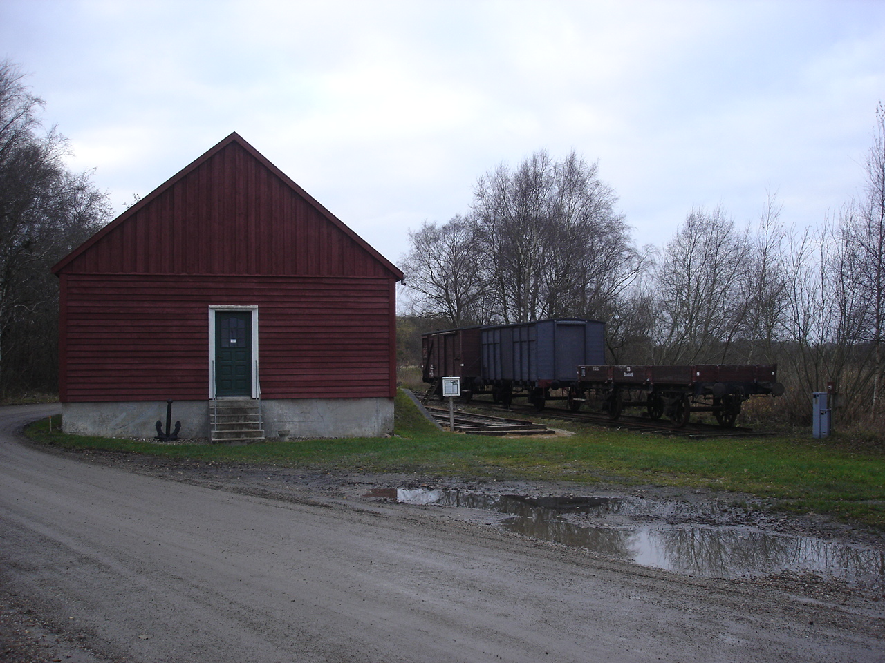 Sundsøre Pakhus, østgavlen